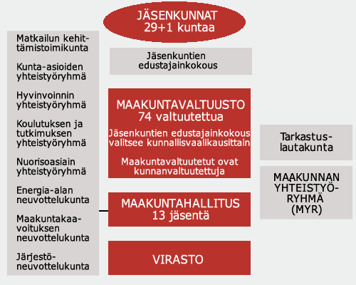 Luottamushenkilöorganisaatio 1.1.2013